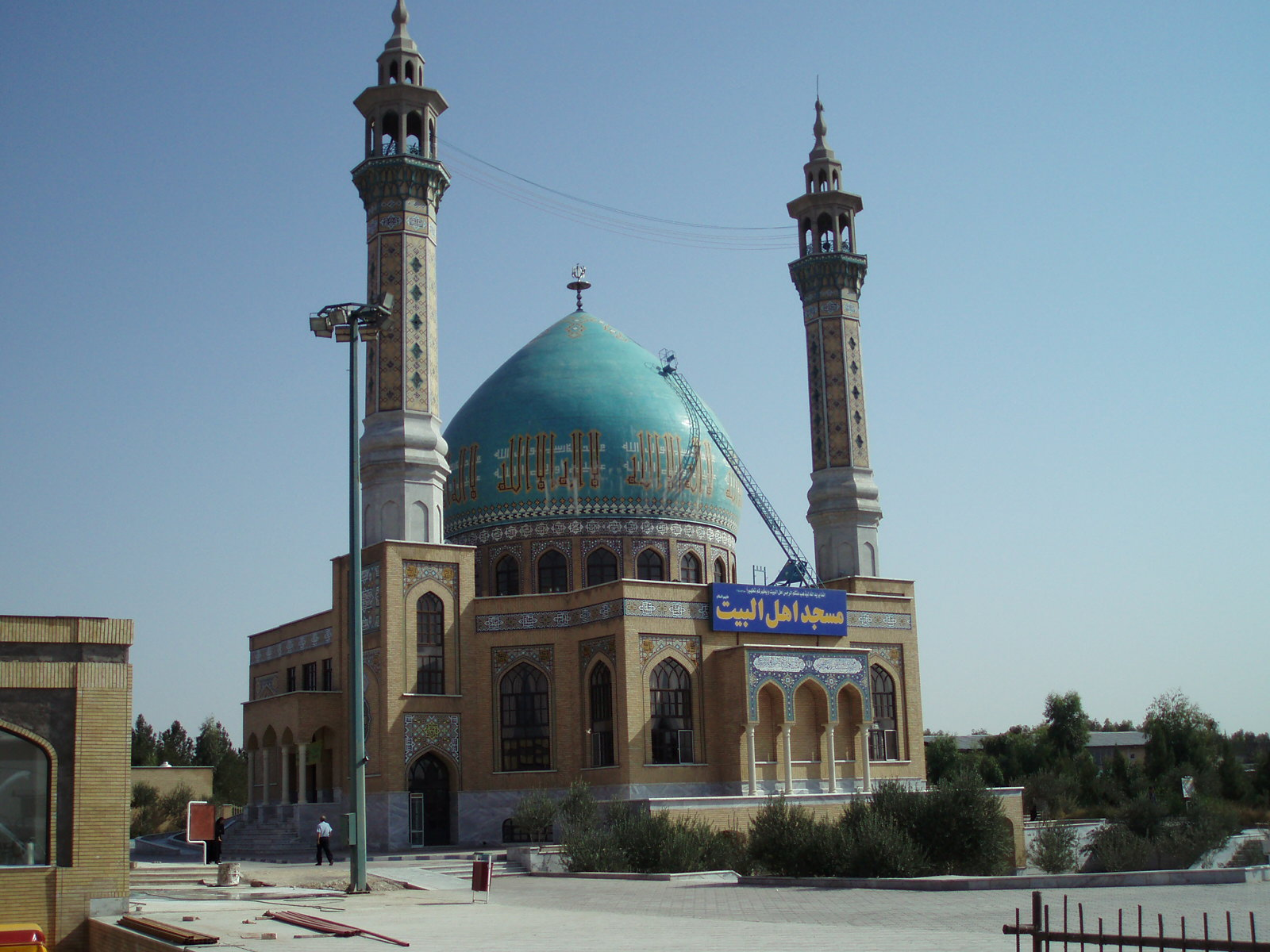 Iran 2007 259 Qom Mosque